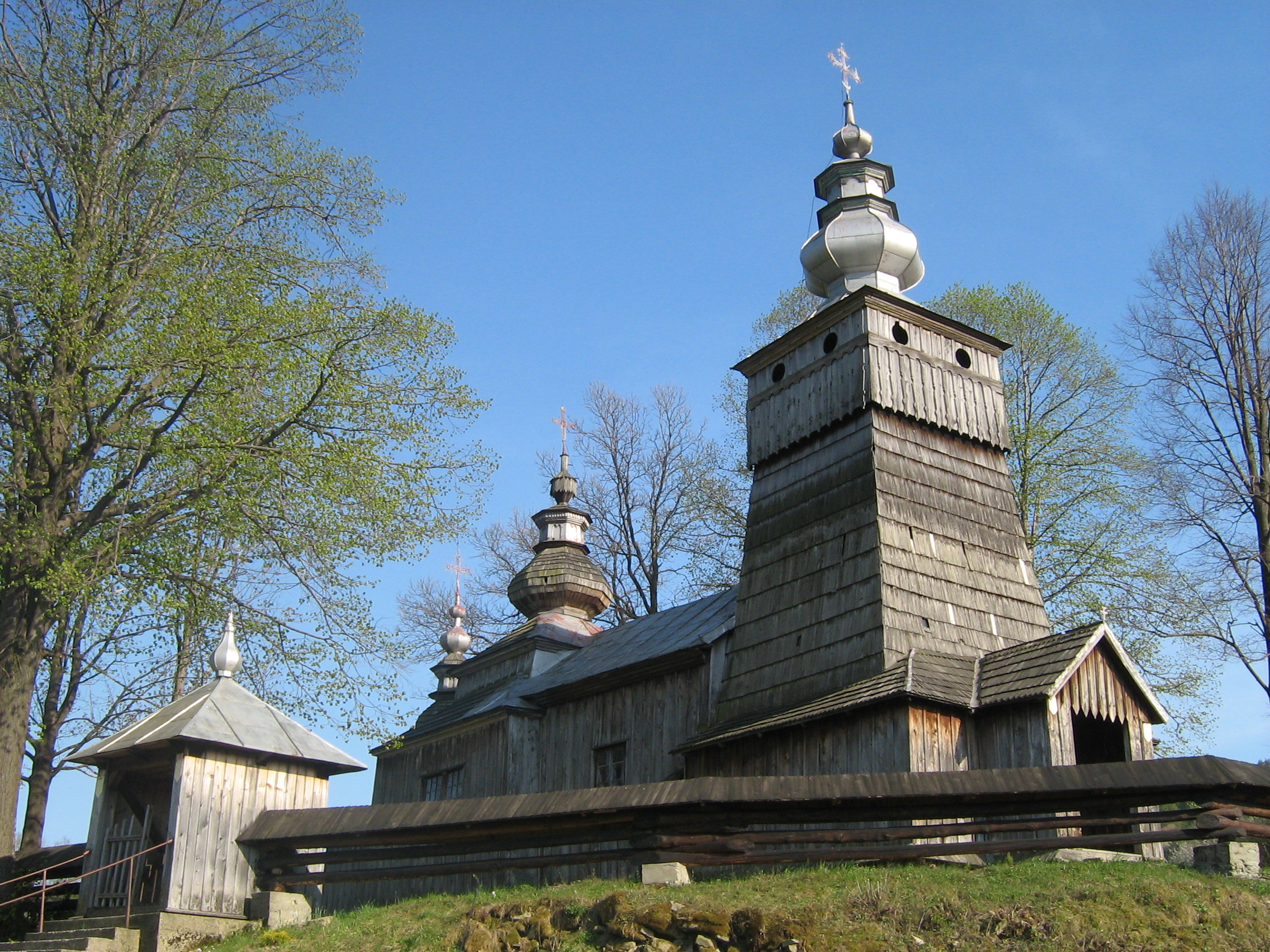 Cerkiew w Świątkowej Małej (obecnie kościół rzymskokatolicki)